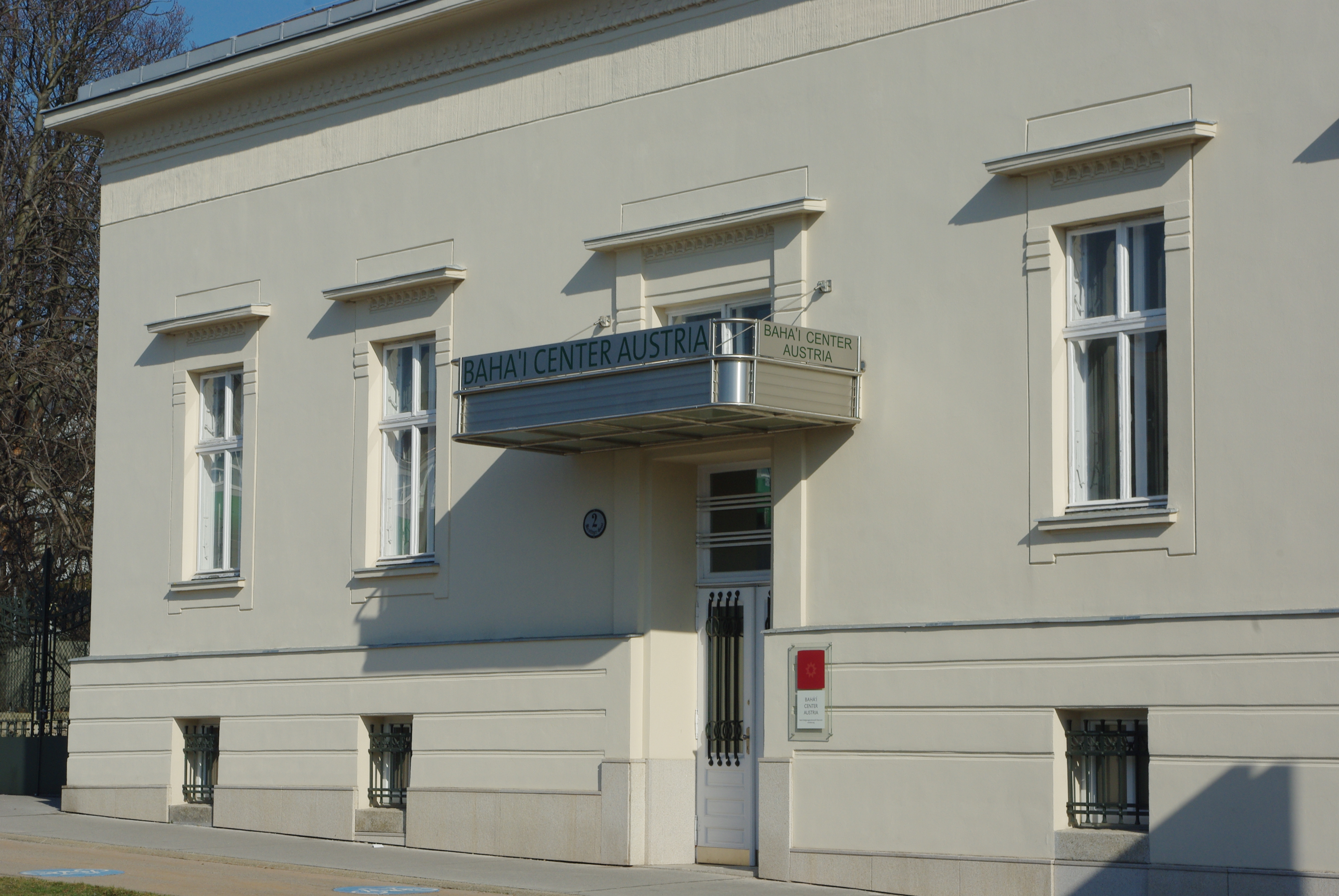 Maroltingergasse 2, 1140 Wien